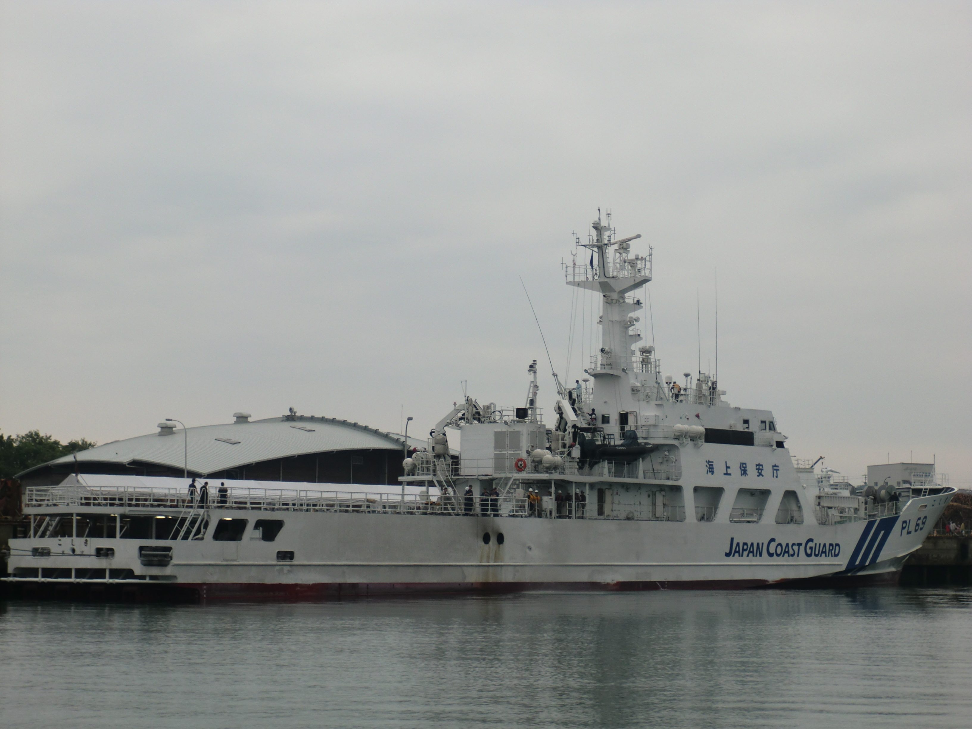 水俣港に停泊中の海上保安庁巡視船こしき(PL69)